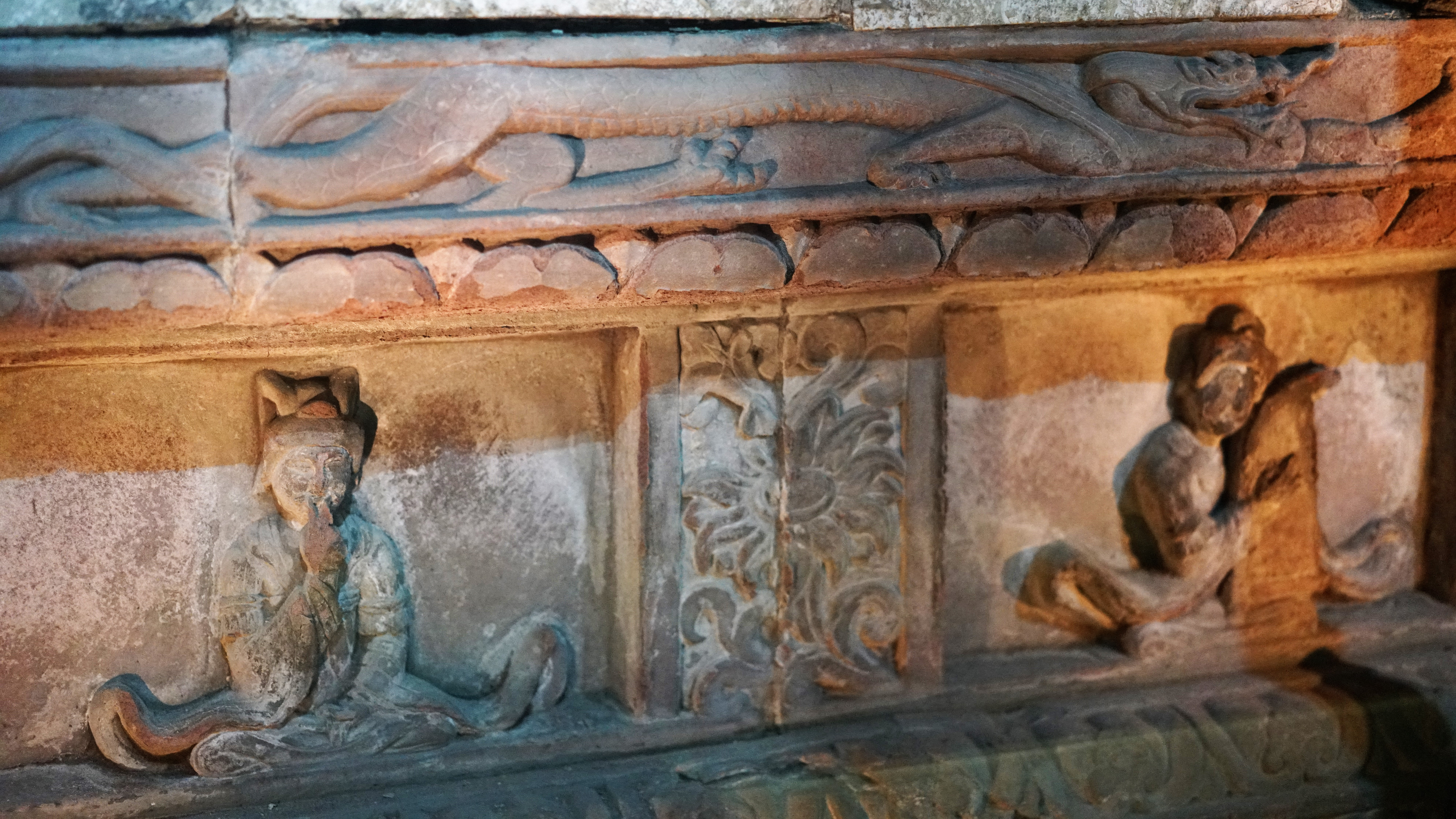 中文（中国大陆）: 二十四伎乐图